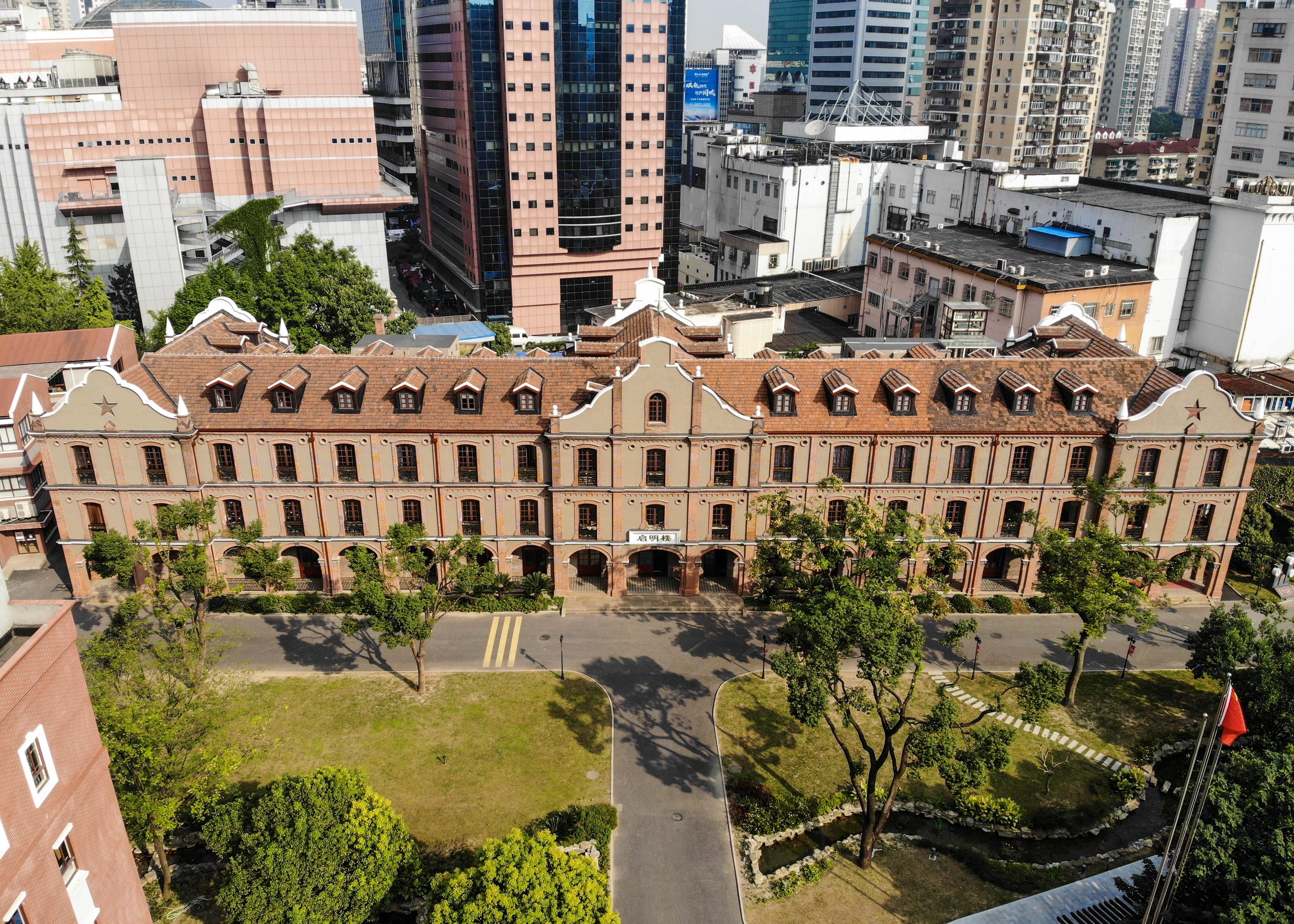 中文（中国大陆）: 启明女校旧址 天钥桥路100号